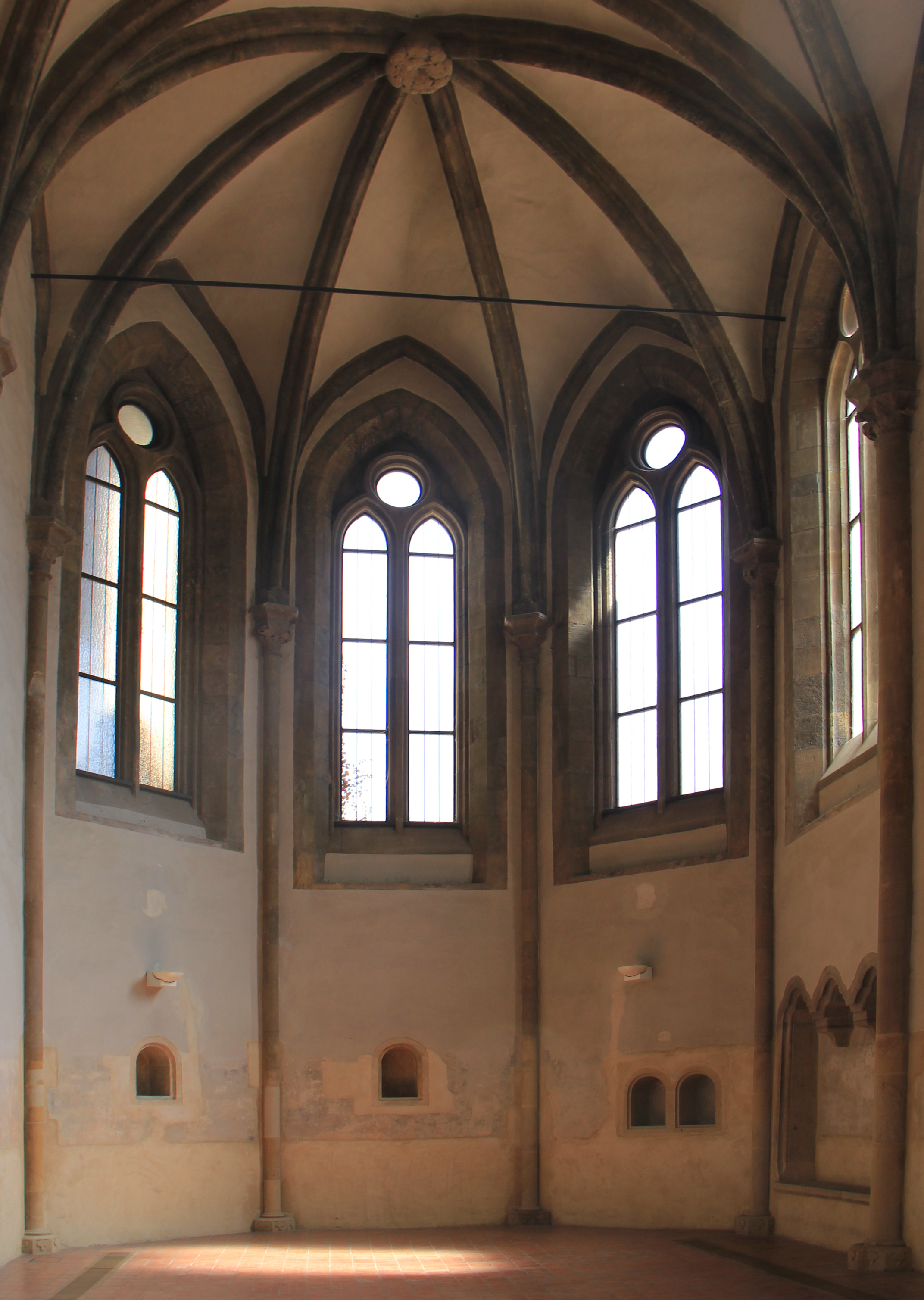 Пресвитерий костела Святого Франциска